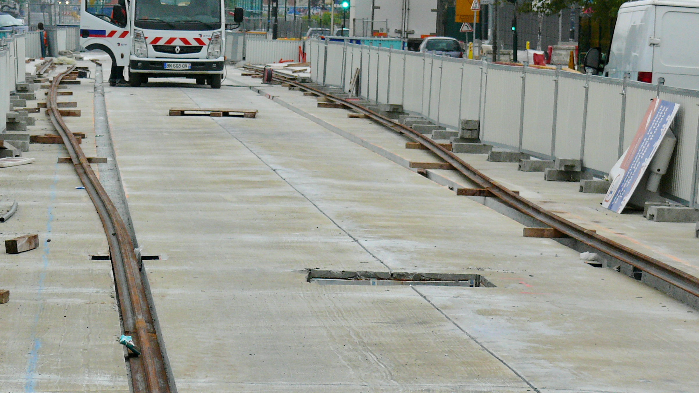 Pose du rail de guidage sur la Plate-forme en béton-armé, à Pierrefitte